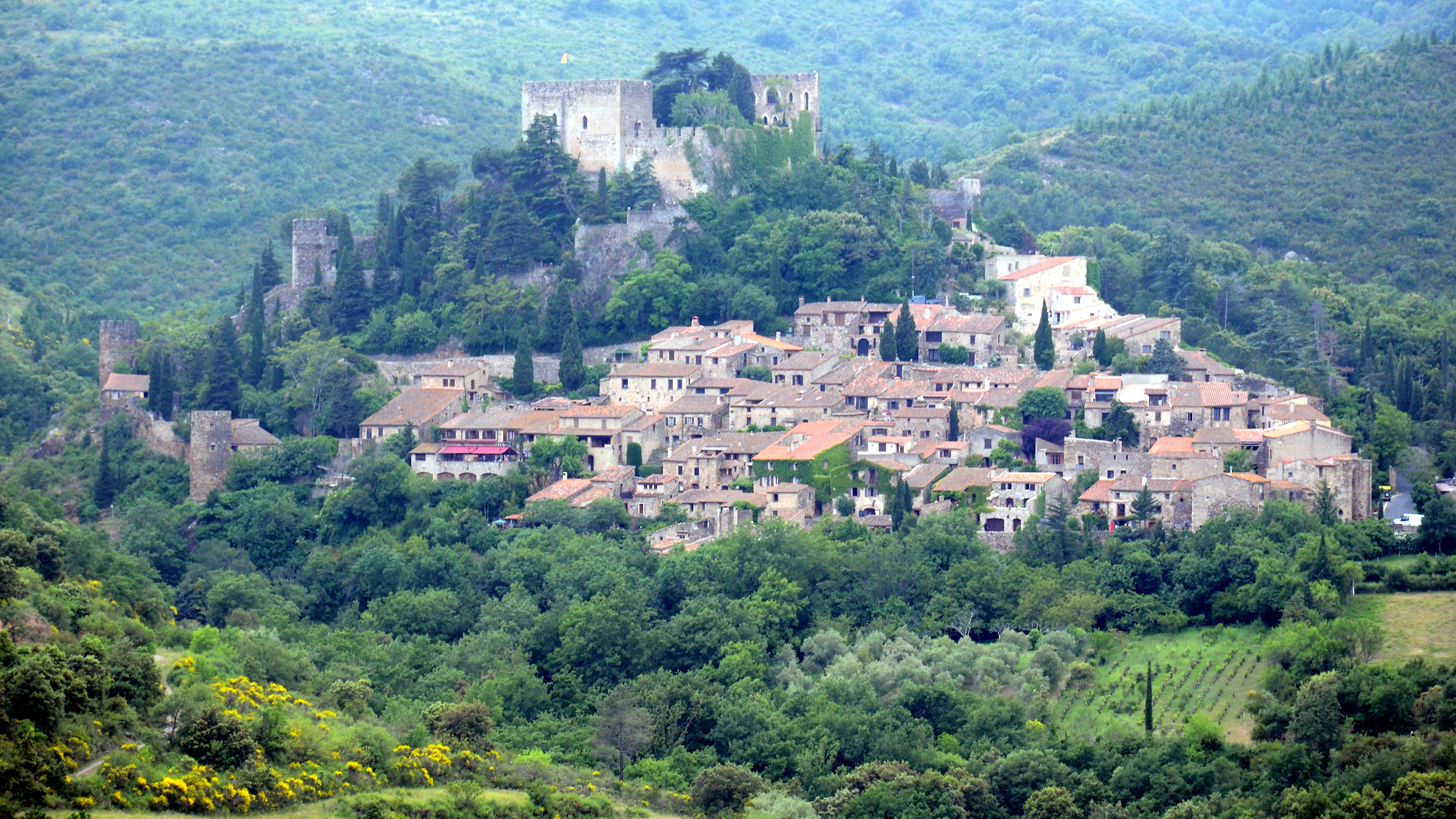 Castelnou, Gesamtansicht, (Les Plus Beaux Villages de France)